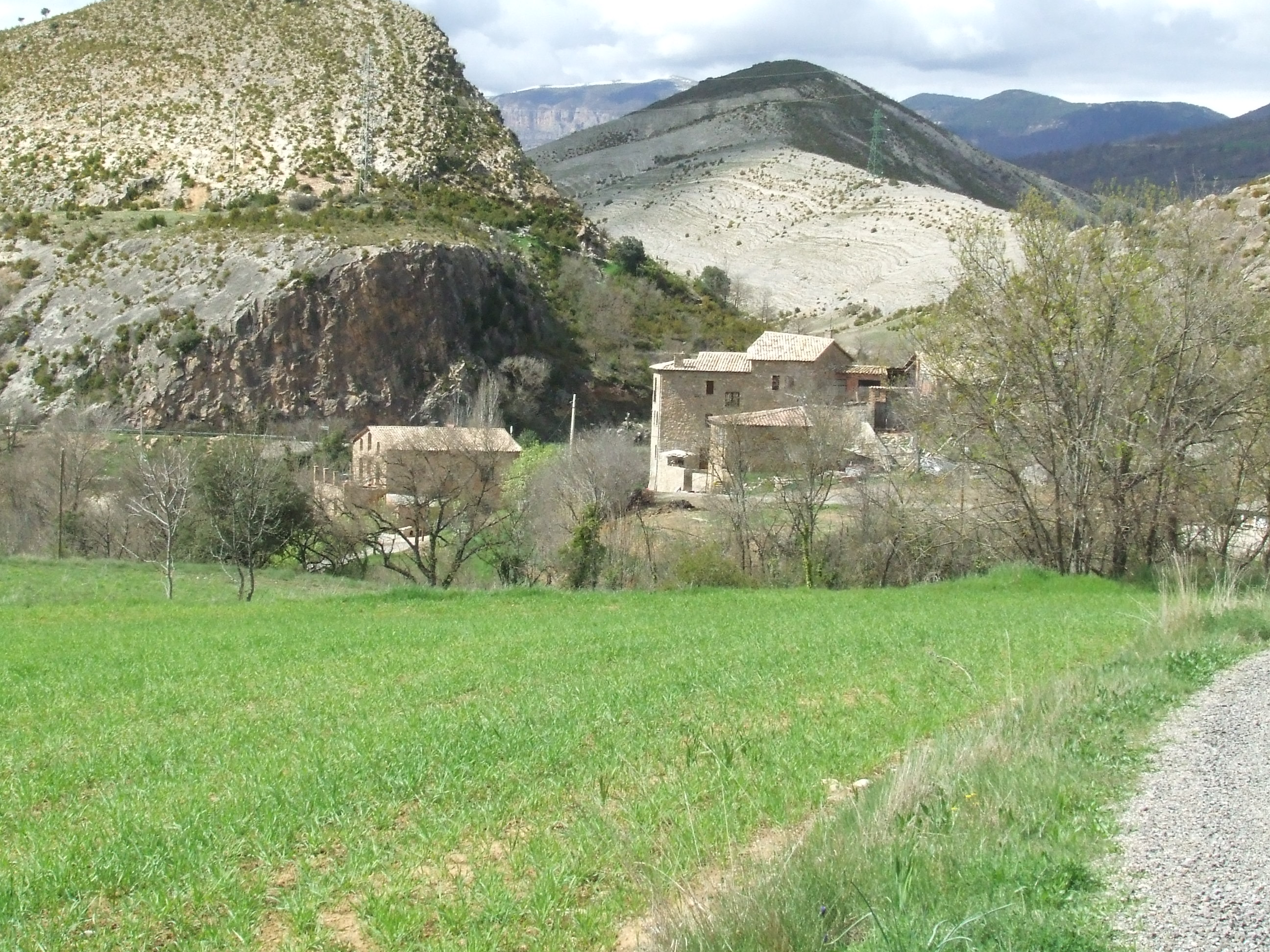 El Pont d'Orrit (Sapeira, Tremp, Pallars Jussà)